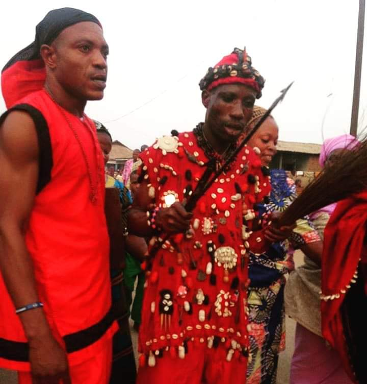 Obaluaiye manifestado em uma pessoa em seu festival, segurando uma lança e uma vassoura